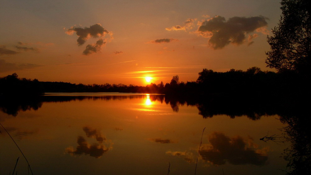 The sunset on the Sadská lake, near town Sadská, region Nymburk, country Czech Republic, Europe / Západ slunce, jezero Sadská, okres Nymburk, Česká republika, Evropa